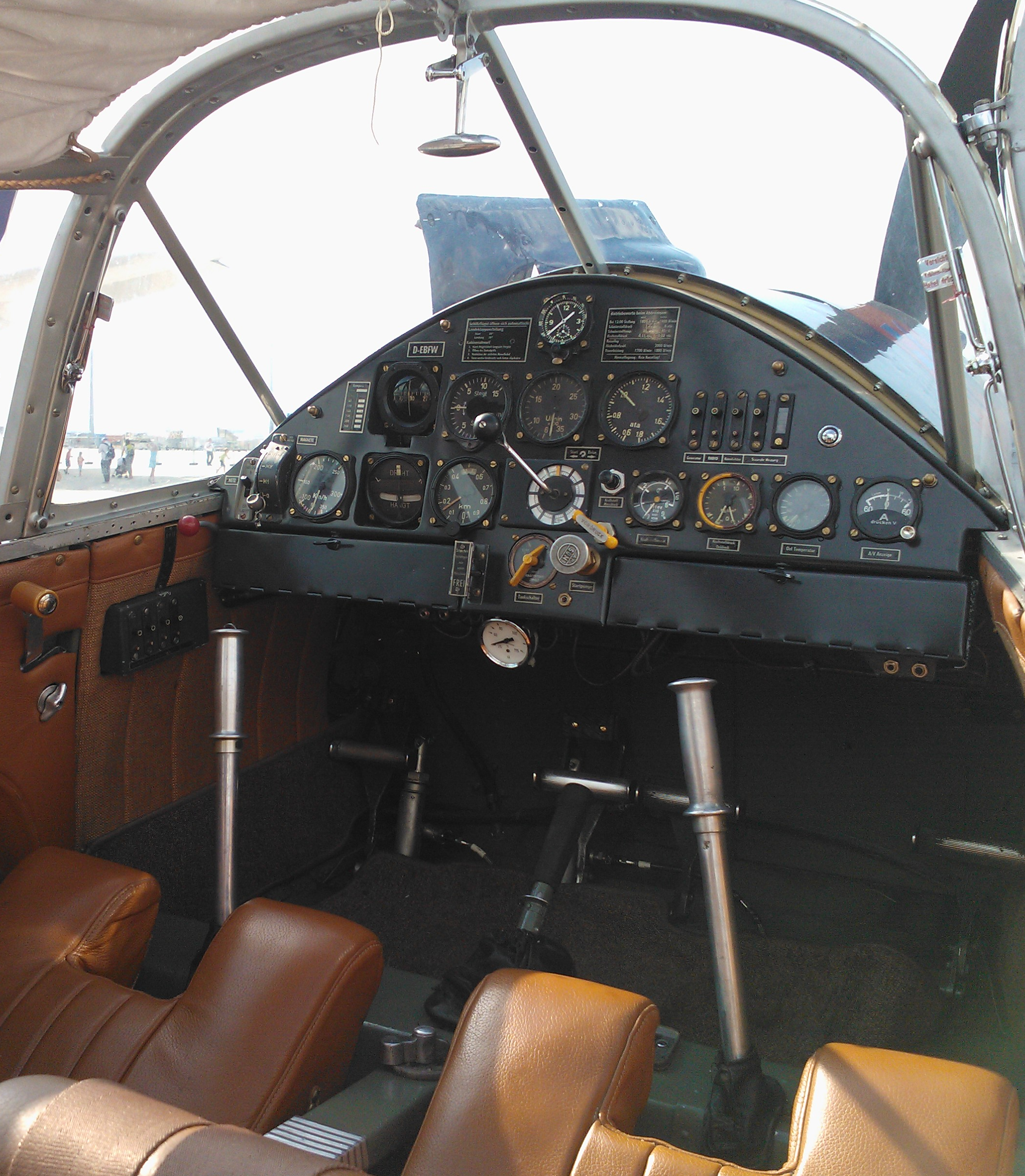 Cockpit einer Messerschmitt Bf-108 Taifun, aufgenommen am 08.06.2013 (Tag der Luftfahrt Flughafen Frankfurt)